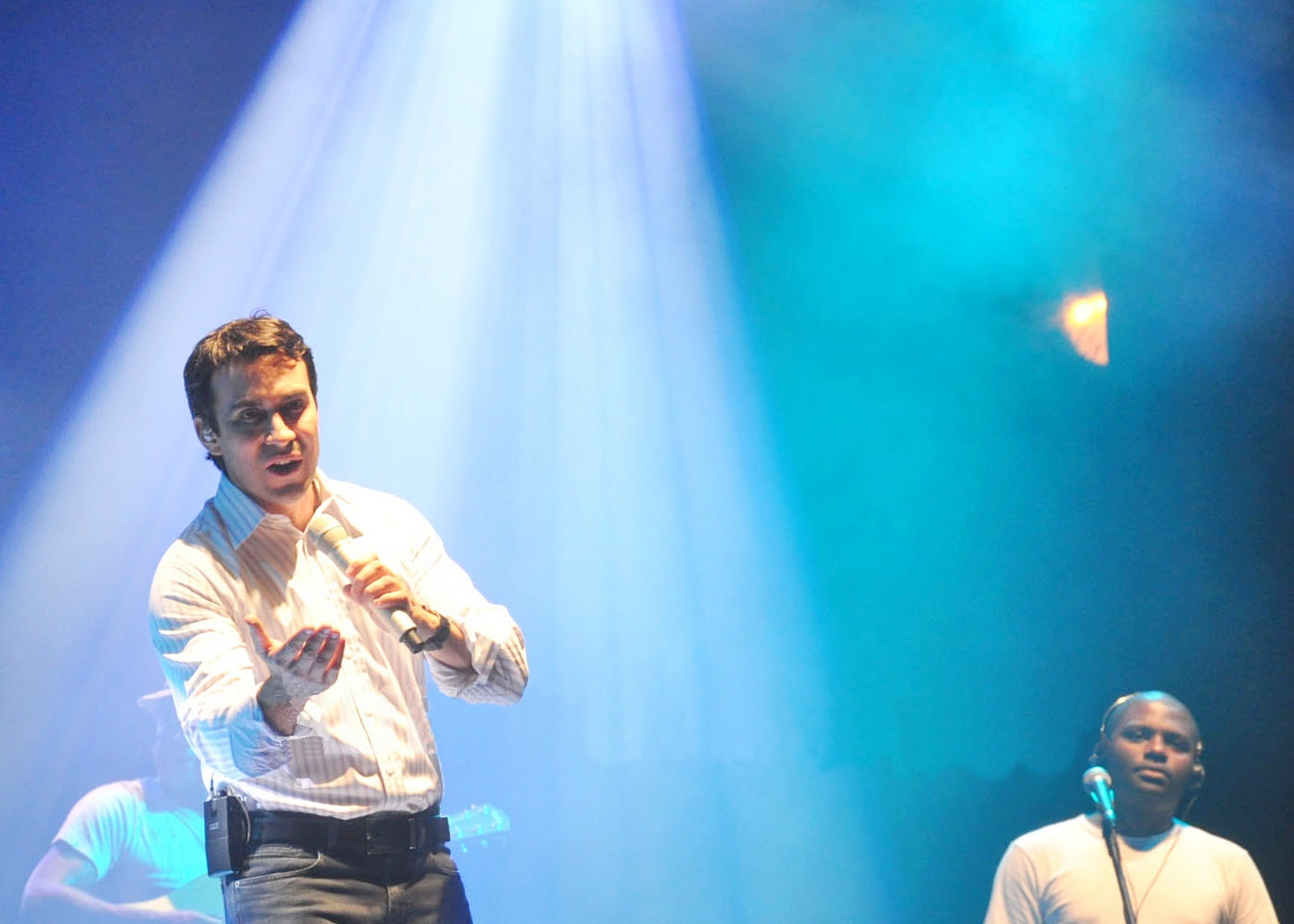 Padre Fábio de Melo em uma apresentação.